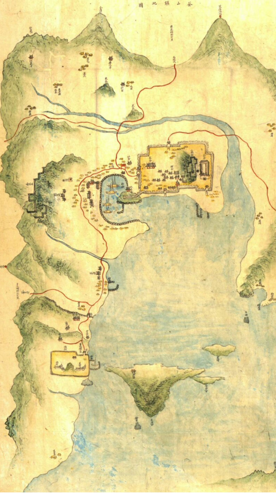 1872년 지방지에 있는 부산진성의 고지도